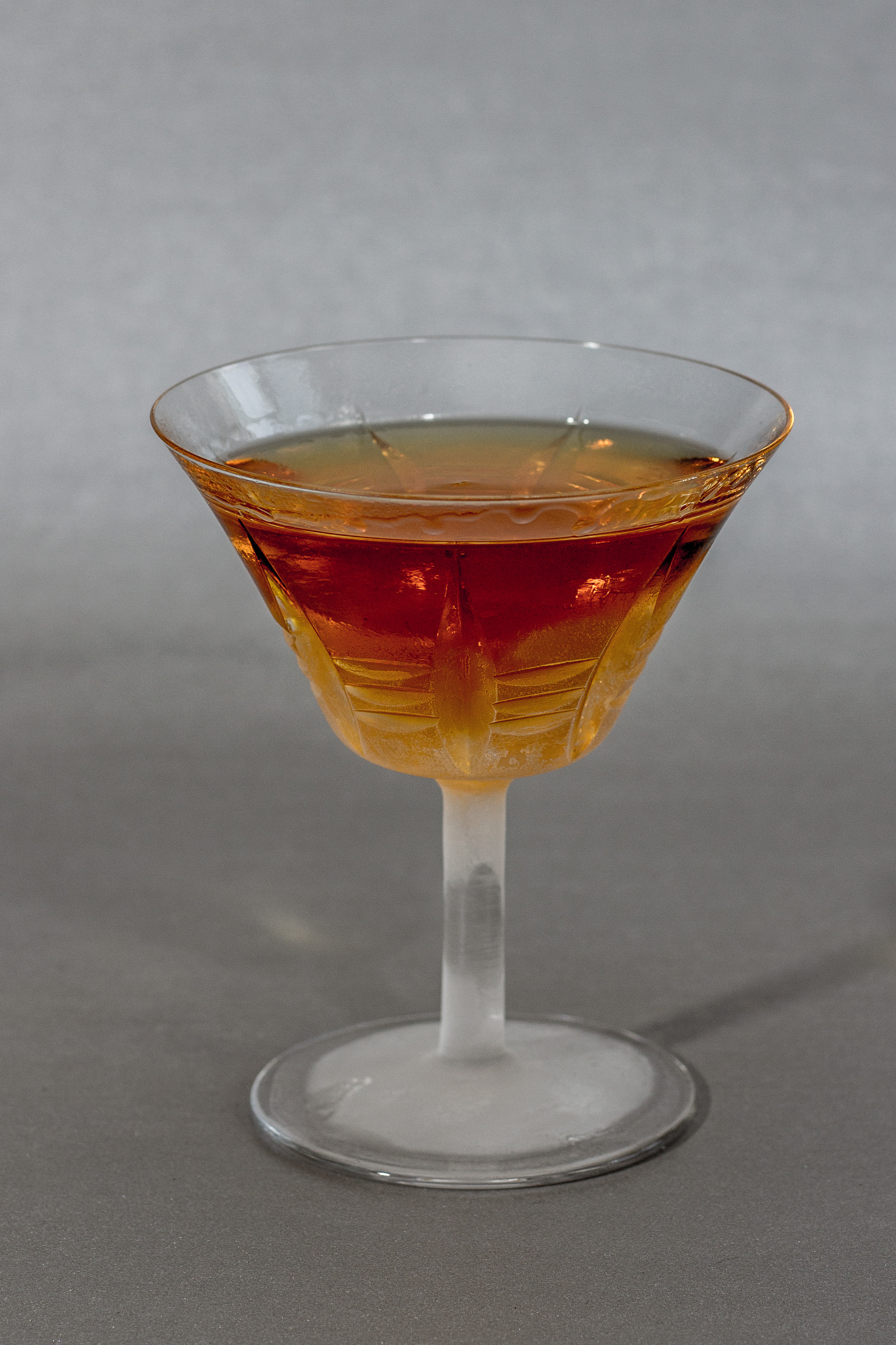 Widows Kiss in Coupe